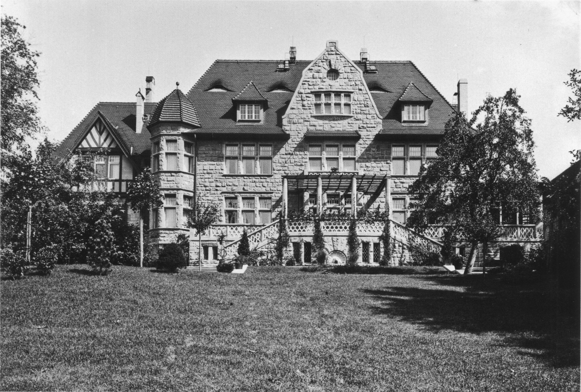 Ansicht der Gartenseite des Landhauses Schulz-Schomburgk (Druckereibesitzer) in der Prinz-Eugen-Straße 42 in Leipzig. Architekt: Peter Dybwad